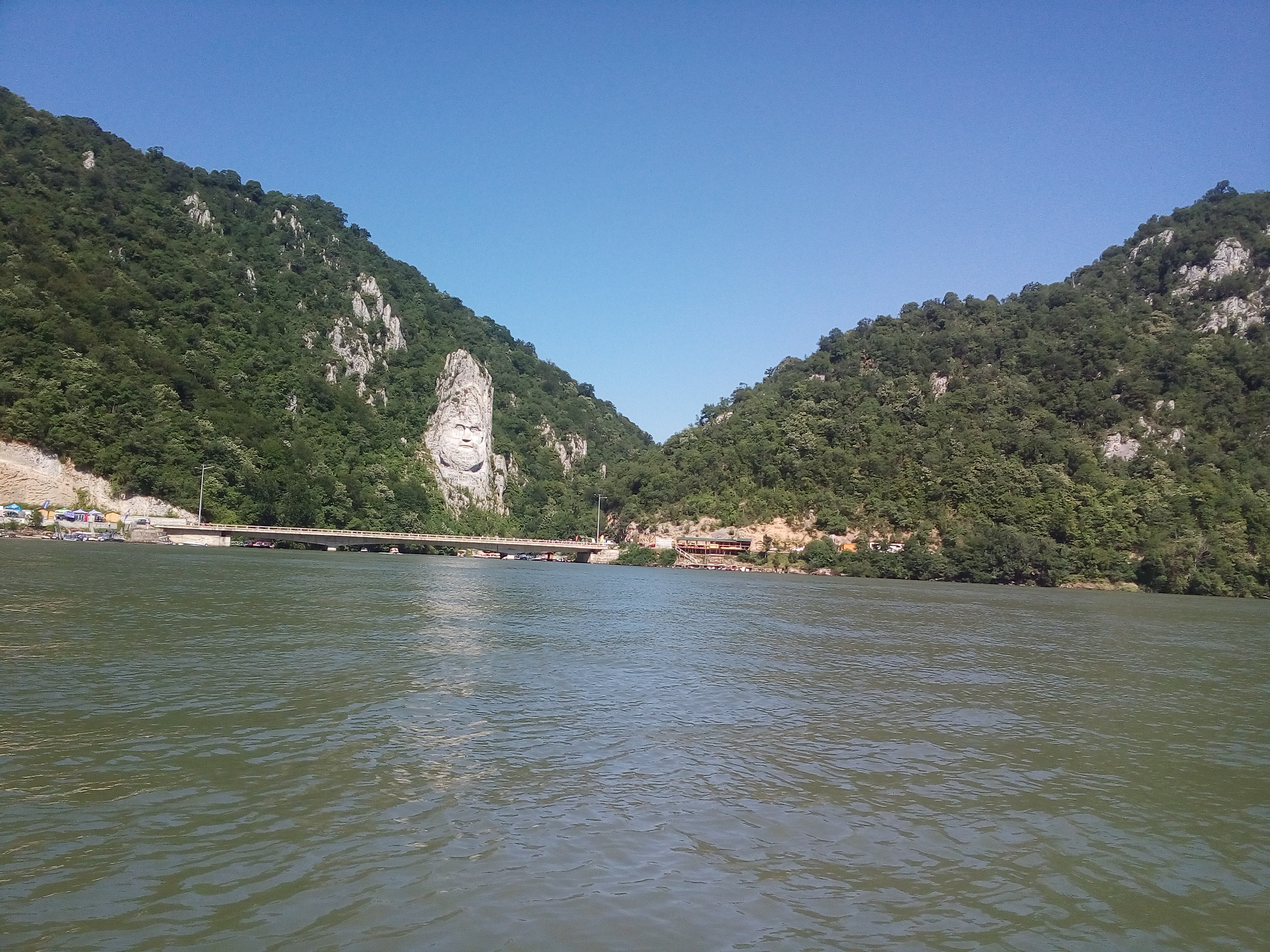 Dački kralj Decibel isklesan Đerdapskoj klisuri